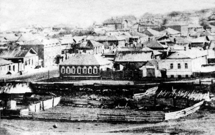 Самара. Перед строительством Кафедрального собора. Юго-западная часть будущей соборной площади. Фотография. ~1860 год.